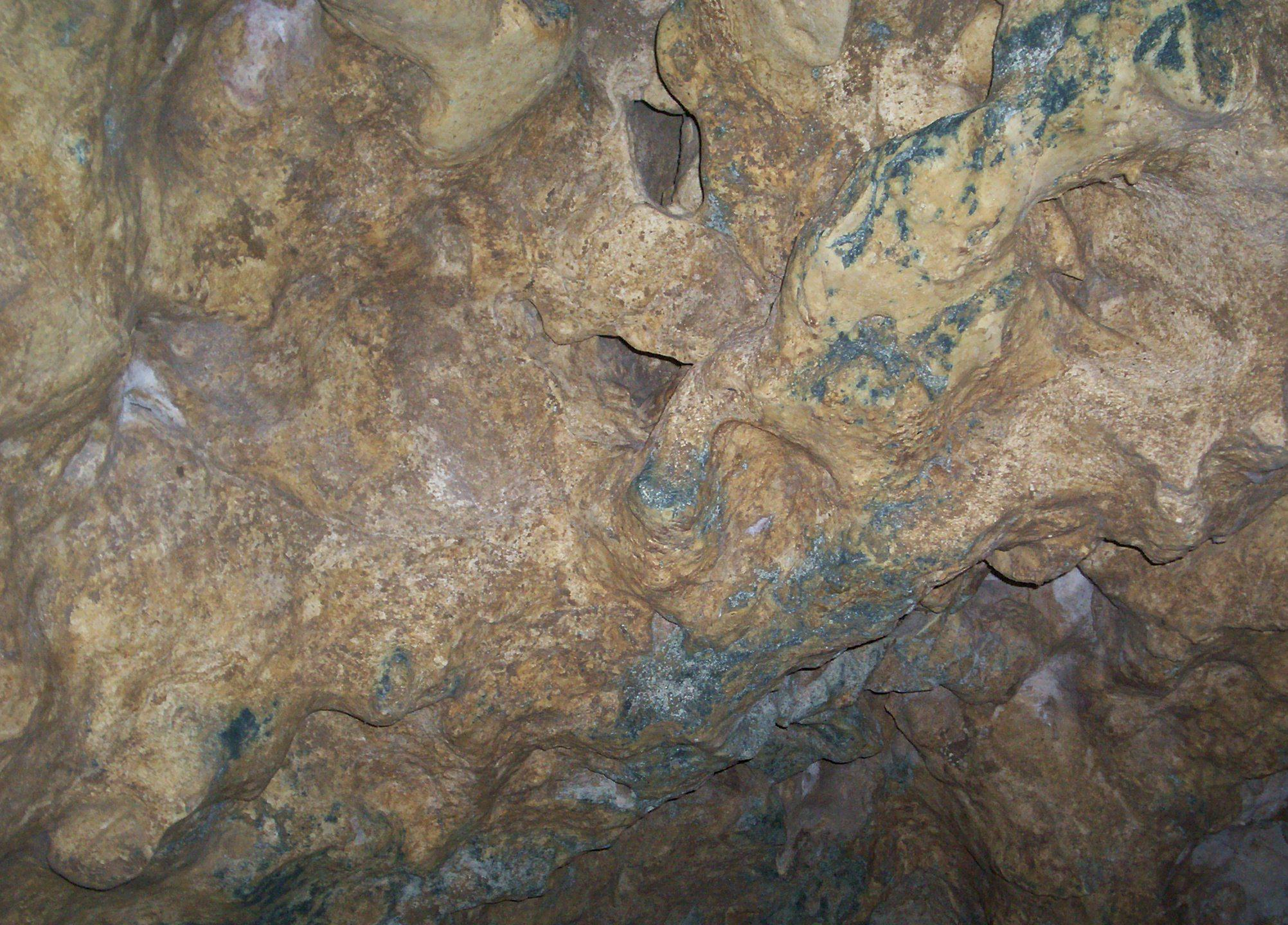 Foto tomada en el interior de la Cueva de la Quebrada del Toro.